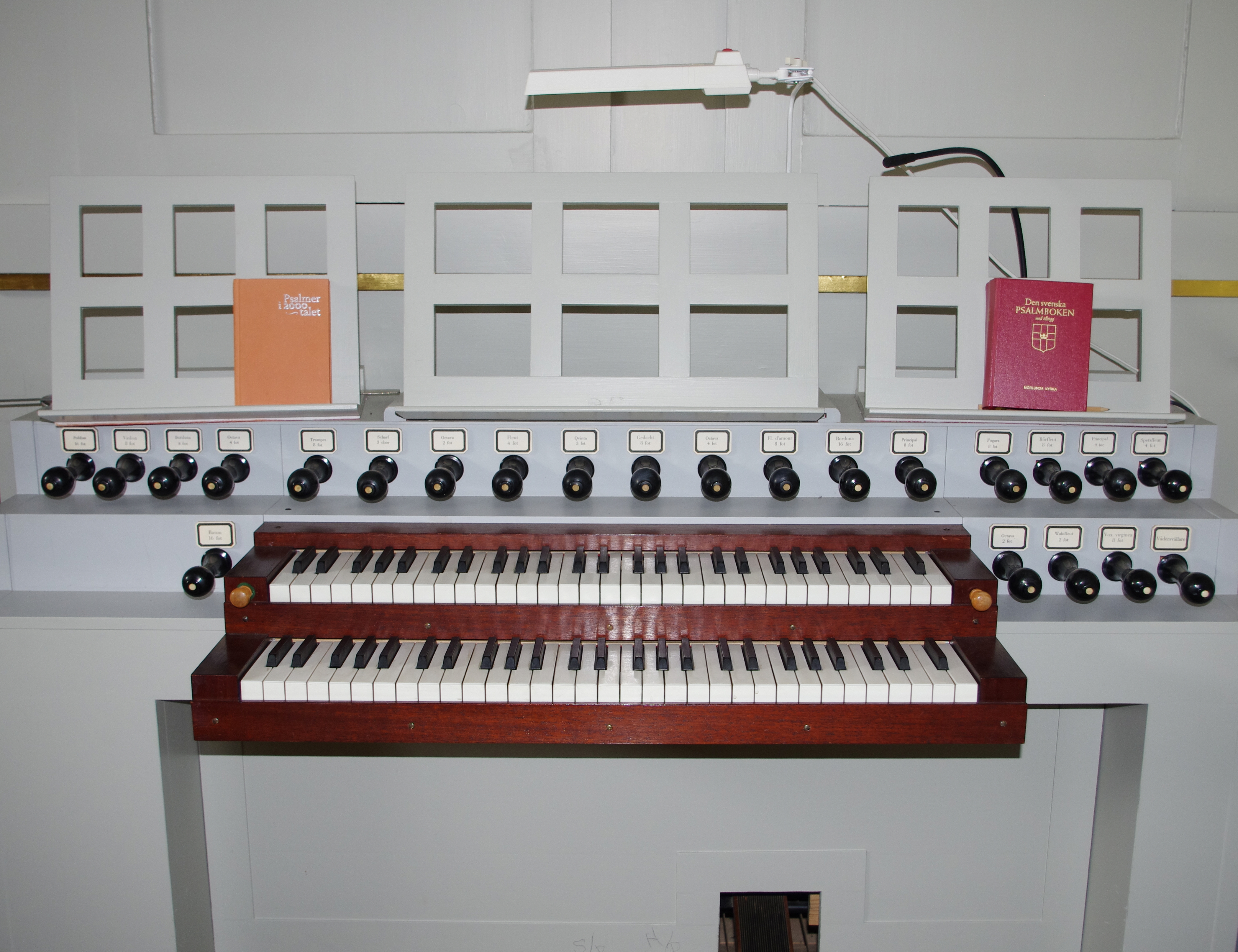 Mörlunda kyrka spelbordet